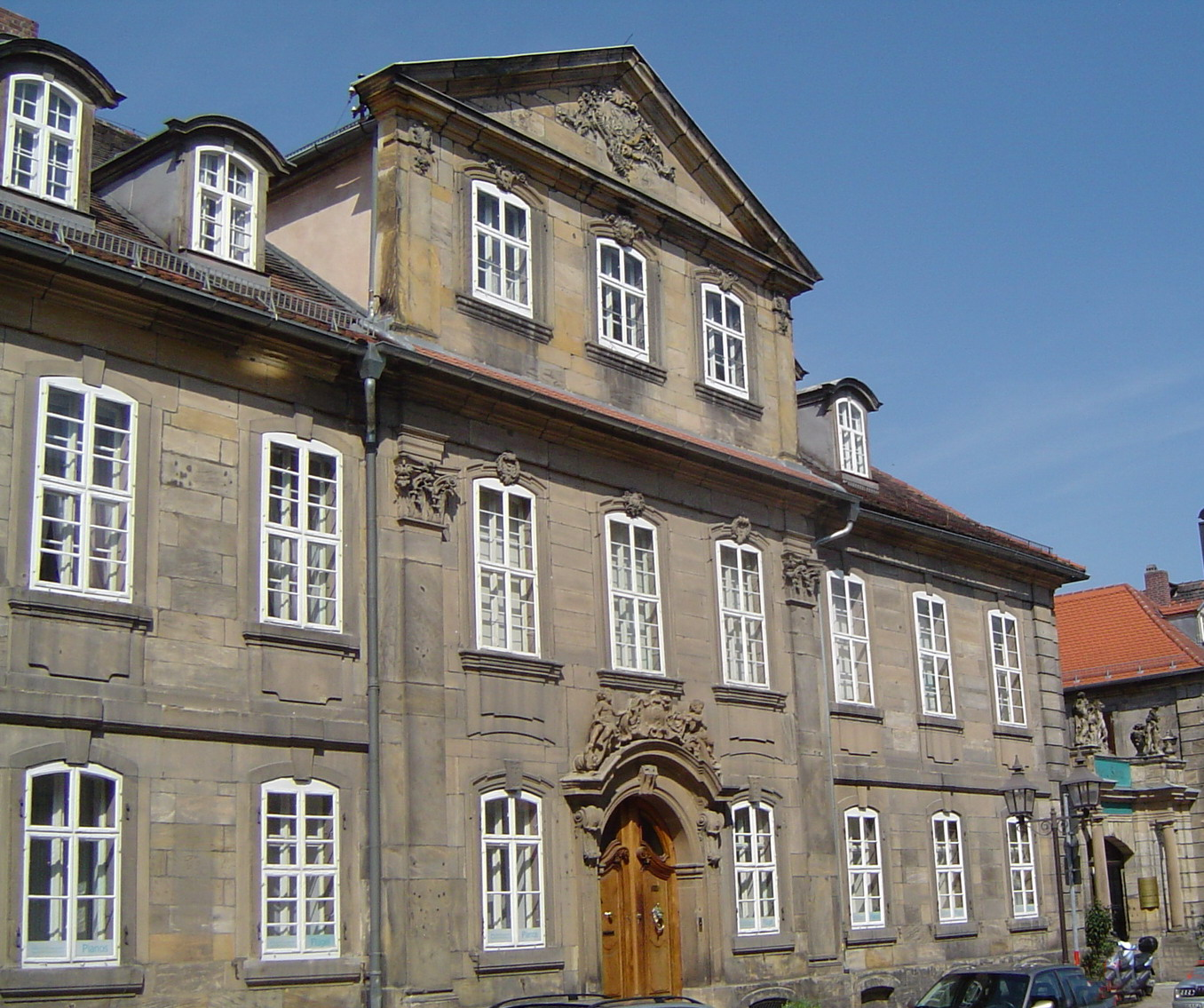 Bayreuth, Steingraeber-Haus, Friedrichstrasse 2, Fassade